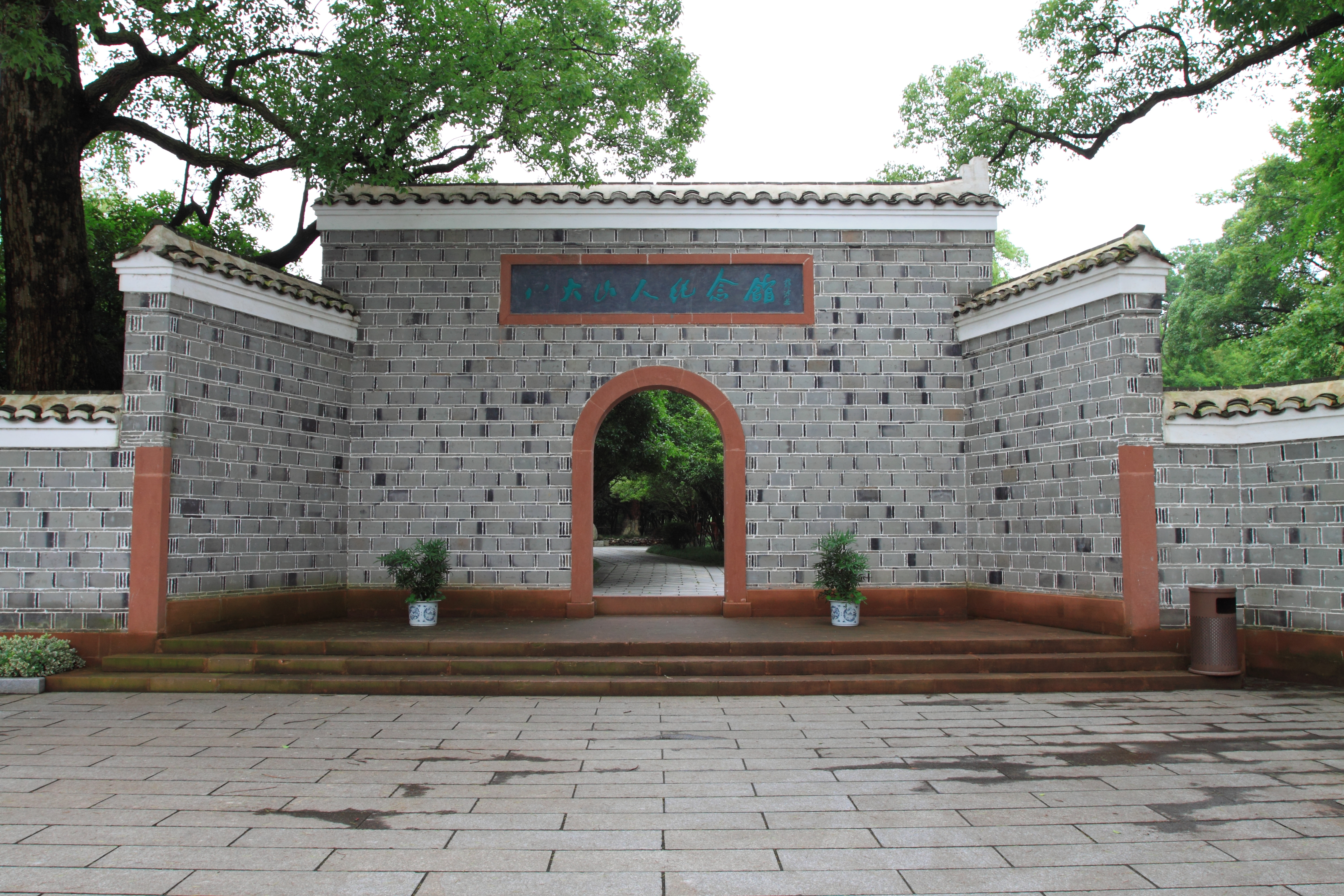 八大山人纪念馆（青云谱），位于中国江西省南昌市。